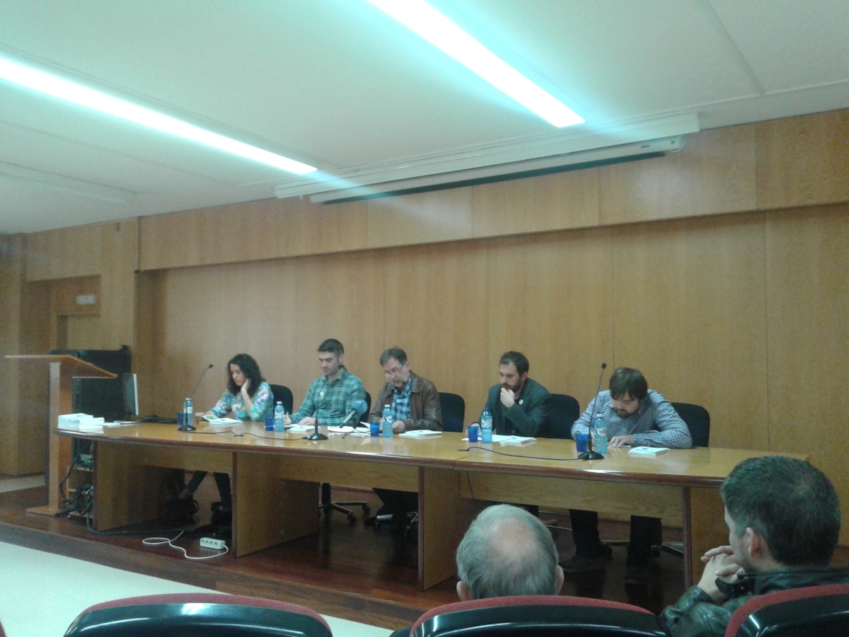 Debate na Universidade da Coruña en relación ó Día das Letras Galegas de 2015. Participan Ánxela Lema, Nel Vidal, Suso de Toro, Marcos Maceira e Moncho do Orzán.